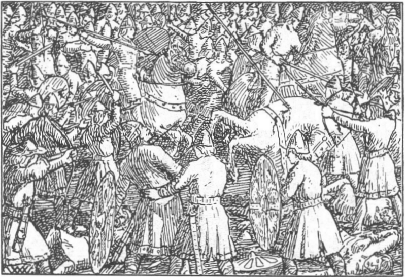 Wilhelm Wetlesen: Illustration for Harald Hardraada saga, Heimskringla 1899-edition. nn: «Kong Harald Sigurdsson vart råka av ei pil i strupen.»